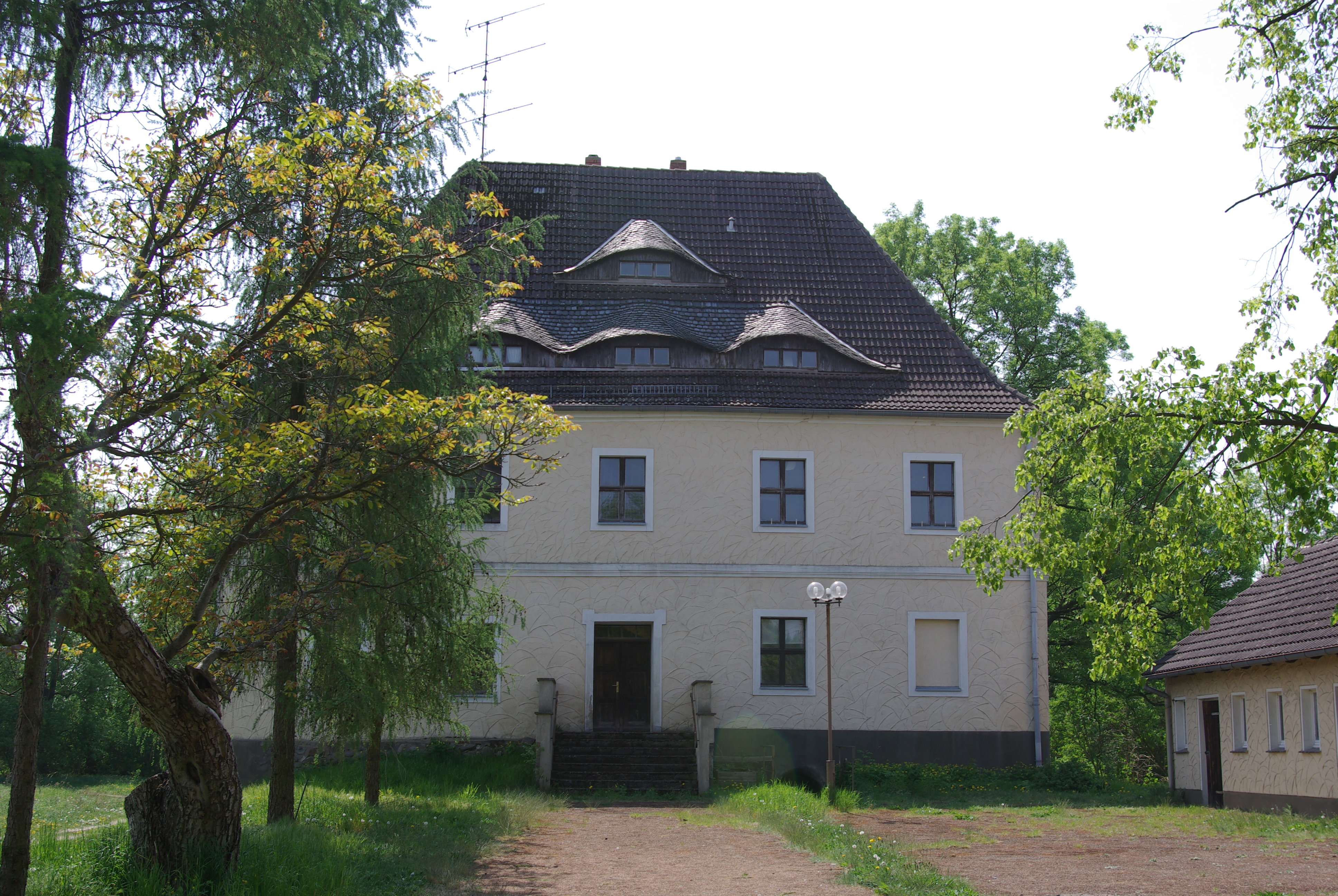 Neu Zauche in Brandenburg. Das Gutshaus stammt aus dem 17. Jahrhundert und steht unter Denkmalschutz.